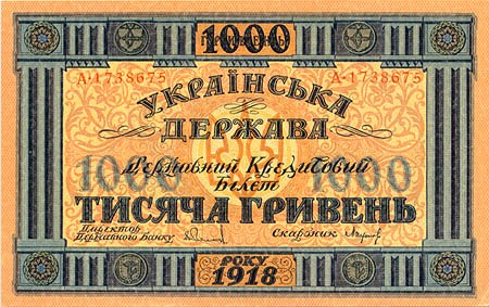 1000 гривен Украинской Державы 1918 года, аверс.